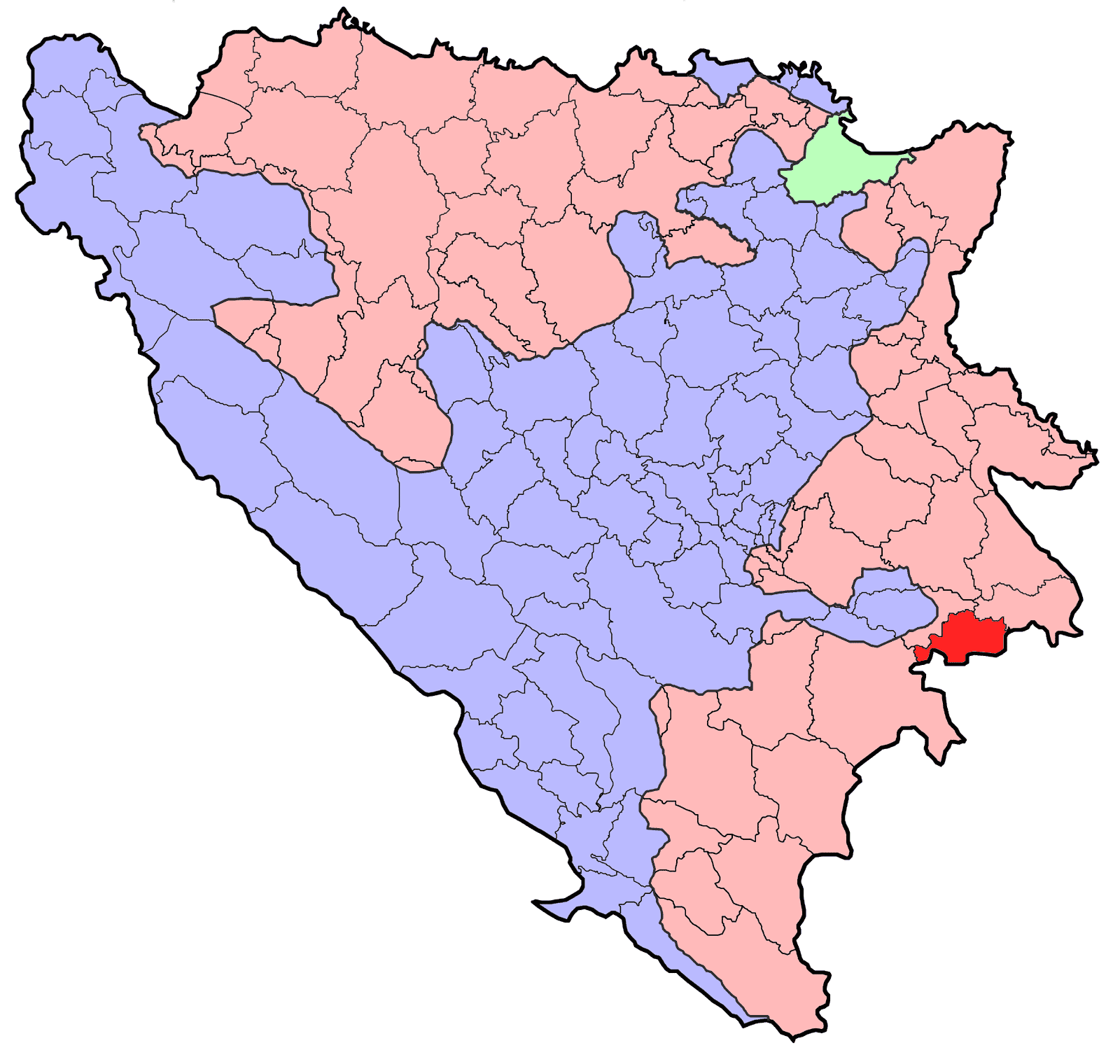 Republika Srpska (BiH) municipality